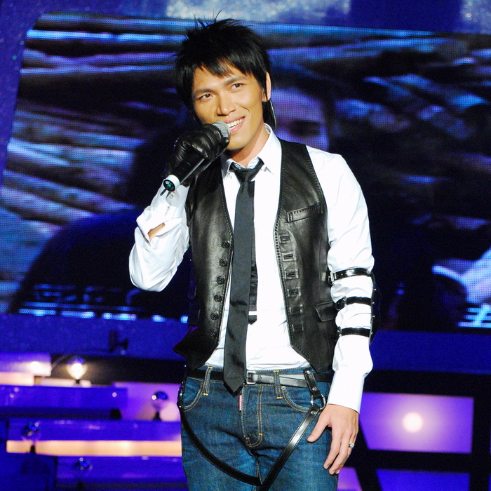 楊宗緯於第42屆金鐘獎電視金鐘獎頒獎典禮演唱《忘不了》。